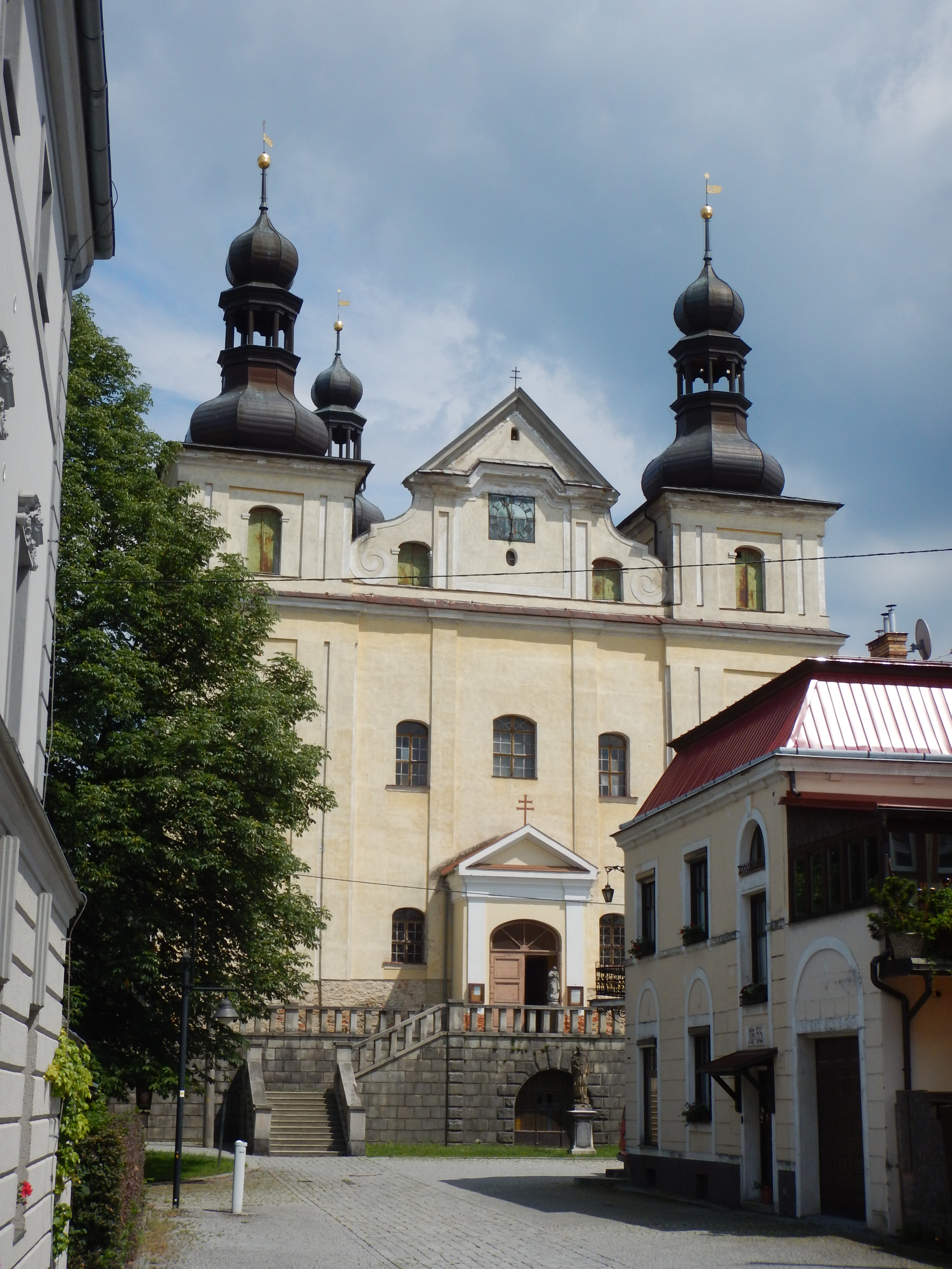 Pohled na budovu farního kostela Nanebezetí Panny Marie ve Zlatých Horách (od restaurace U Radnice)